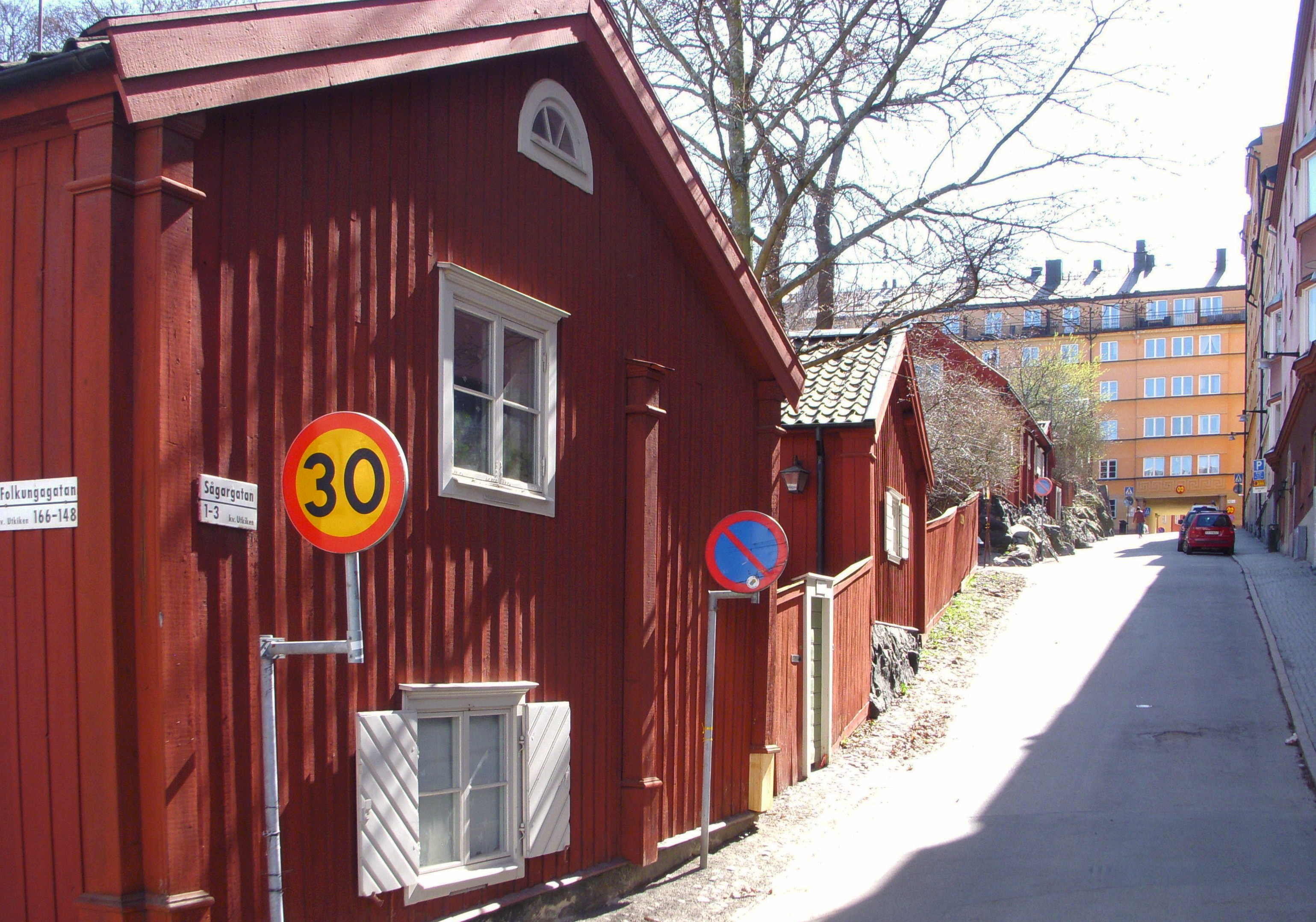 Sågargatan, sedd från Folkungagatan